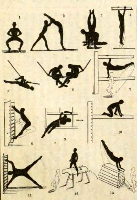 初期のころのドイツ体操